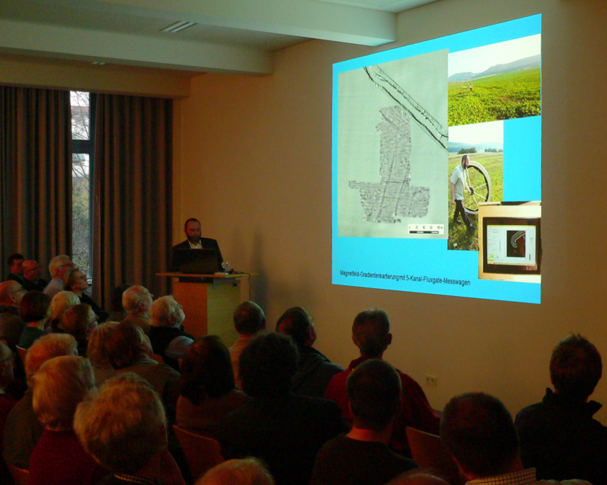 Vortrag des Thüringischen Landesamtes für Denkmalpflege und Archäologie im Niedersächsischen Landesamt für Denkmalpflege in Hannover zum römischen Marschlager bei Hachelbich